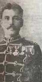 Српски (ћирилица): Милосав Куртовић, оснивач коњичких игара